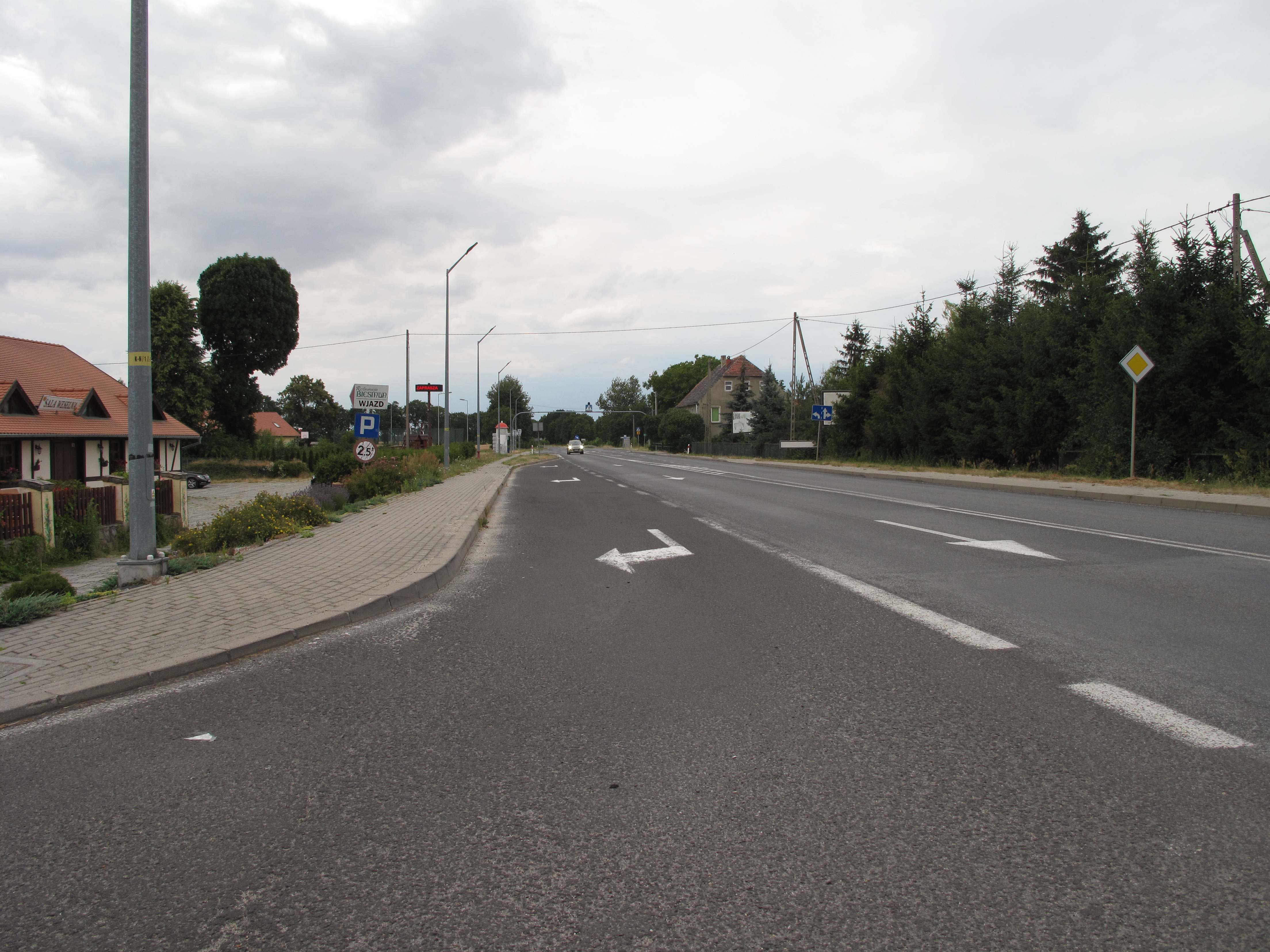 Koźmin (województwo dolnośląskie). Polska.